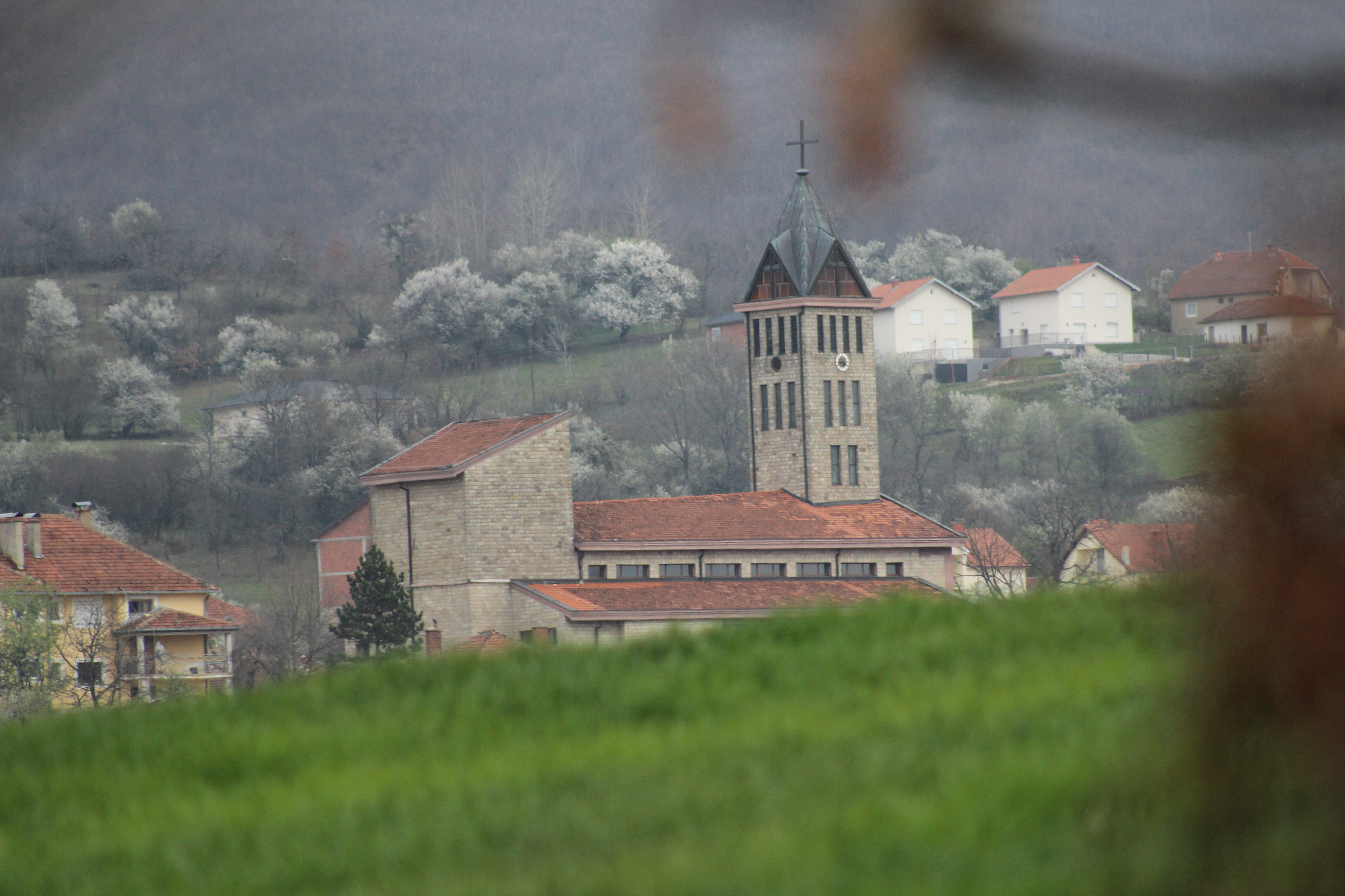 Kisha Shen Jozefi